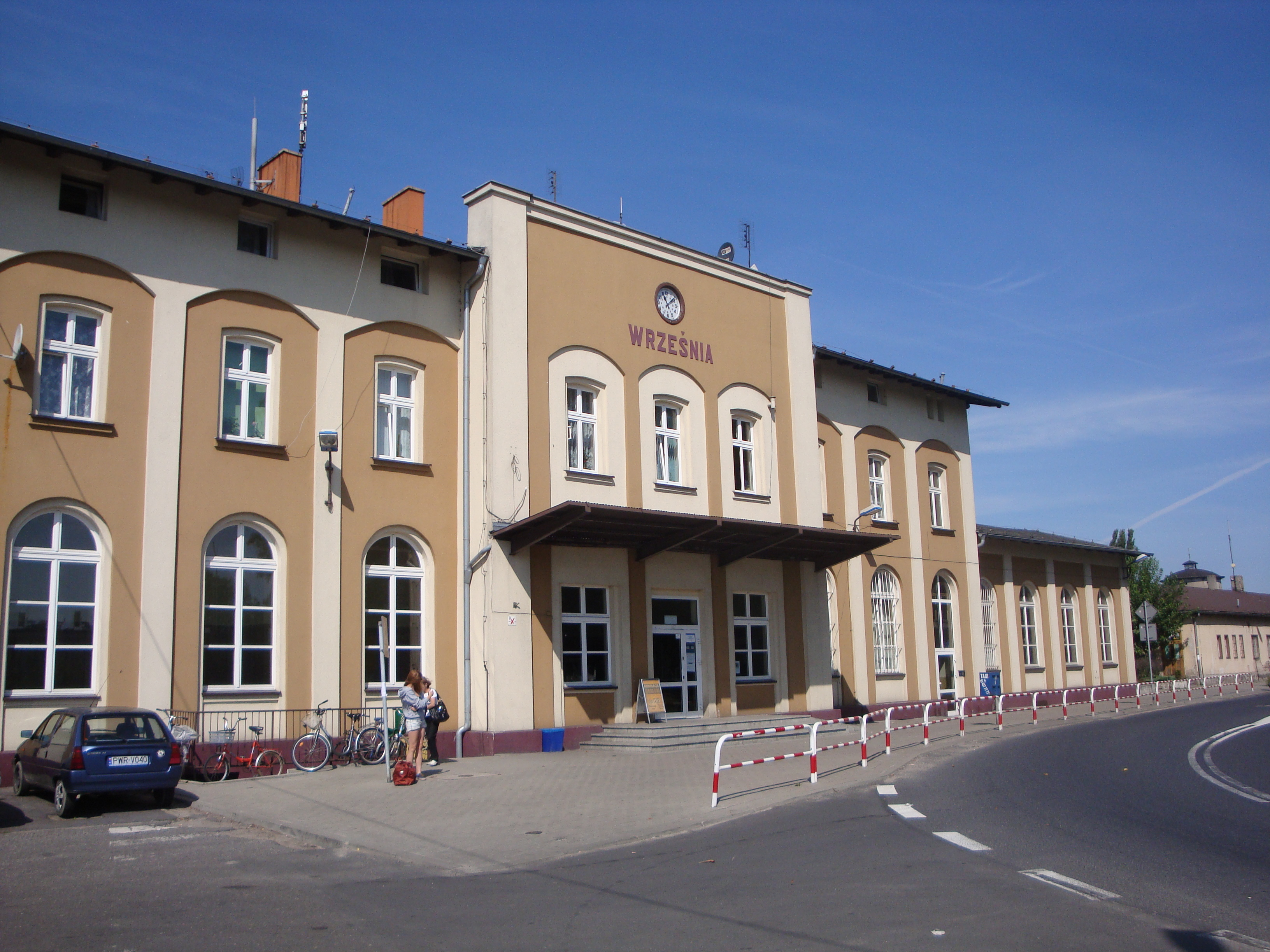 Dworzec kolejowy we Wrześni. This photo was taken during Railway Wikiexpedition 2013 set up by Wikimedia Polska Association. You can see all photographs in category Wikiekspedycja kolejowa 2013. English | Polski | +/−